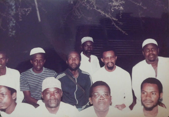 Kiswahili: Nyuma wapili Bakari Saleh, mwisho kulia Ilunga Hassan Kapungu, Mstari wa mbele watatu kutoka kushoto Mwanahistoria - Mwandishi Mohamed Said. Hawa walikuwa baadhi ya vijana wa Kiislamu waliohudhuria Semina Dodoma Chuo Cha Biashara 1988.